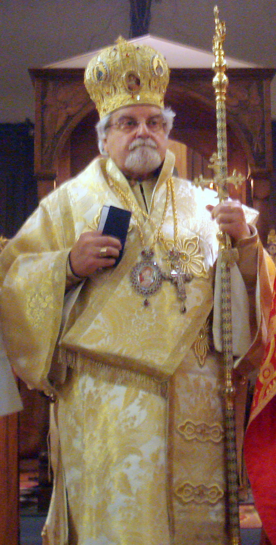 Mgr Dimitrios Salachas, évêque de Gratianopolis, exarque pour les byzantins catholiques de Grèce